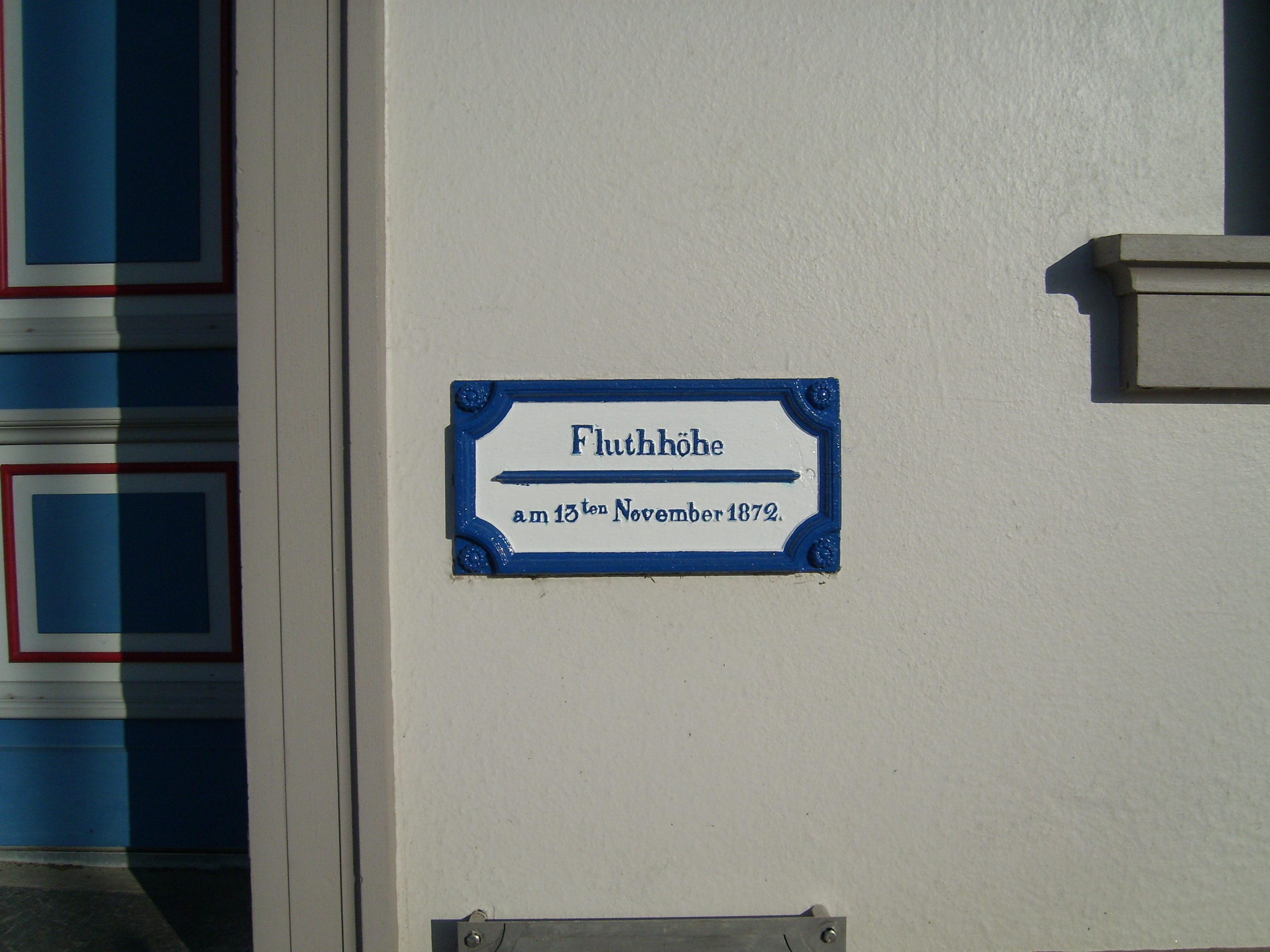 Markierung des Flutpegels von 1872 am Hafenamt in Greifswald-Wieck